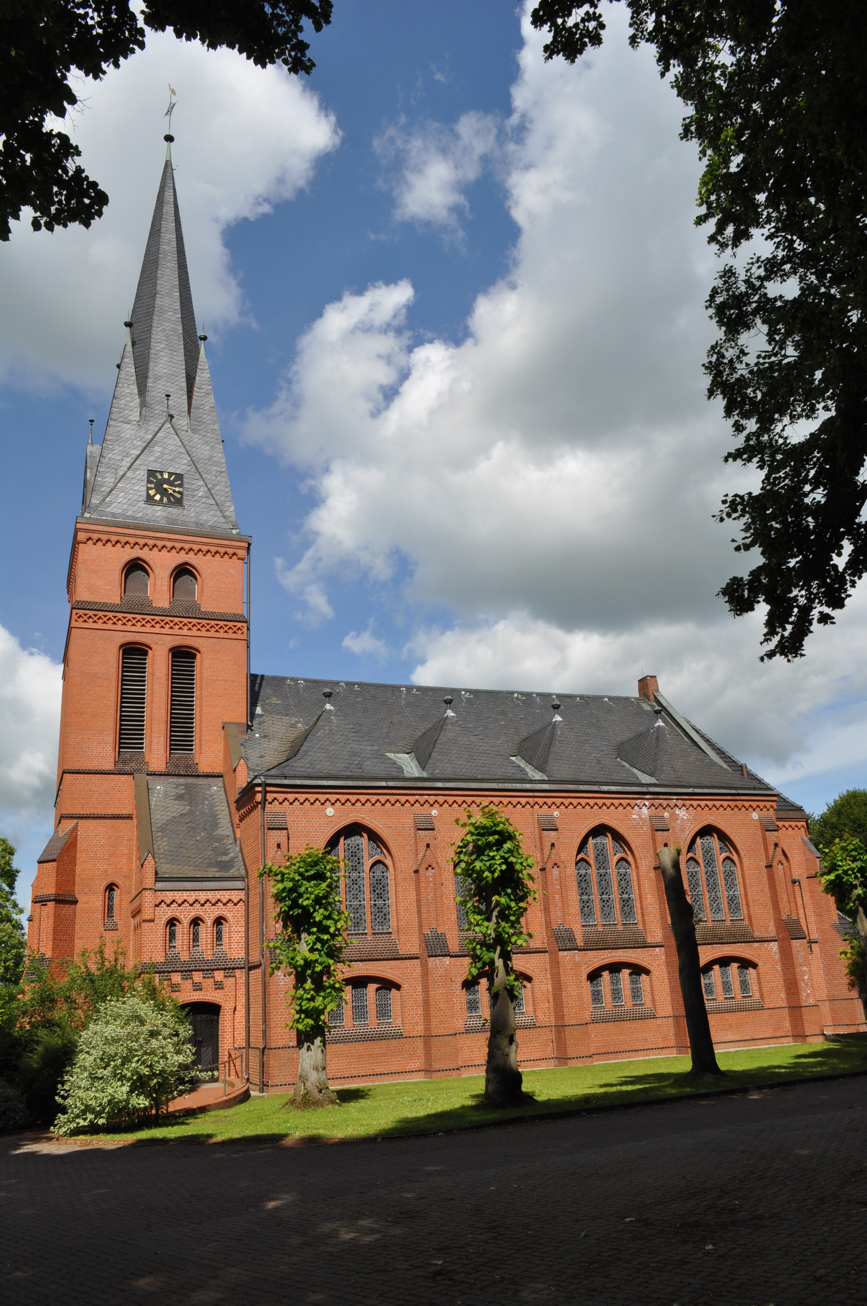 Christuskirche in Hemmoor-Warstade, Ansicht von Südwesten. This is a photograph of an architectural monument. .202.200.017